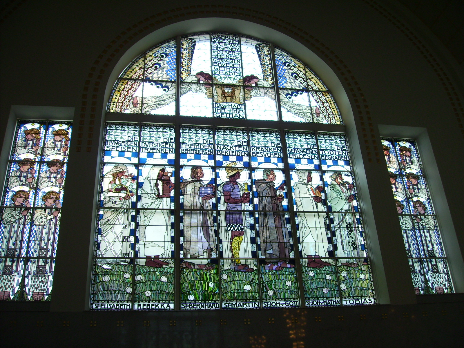 Otto Wagner, Architekt des Jugendstil in Wien (1841 - 1918). Heil- und Pflegeanstalt "Am Steinhof" mit der weltweit bedeutendsten Jugendstilkirche. 14. Bezirk, Baumgartner Höhe 1. Erbaut 1905 bis 1907.